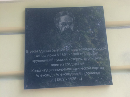 г. Иркутск